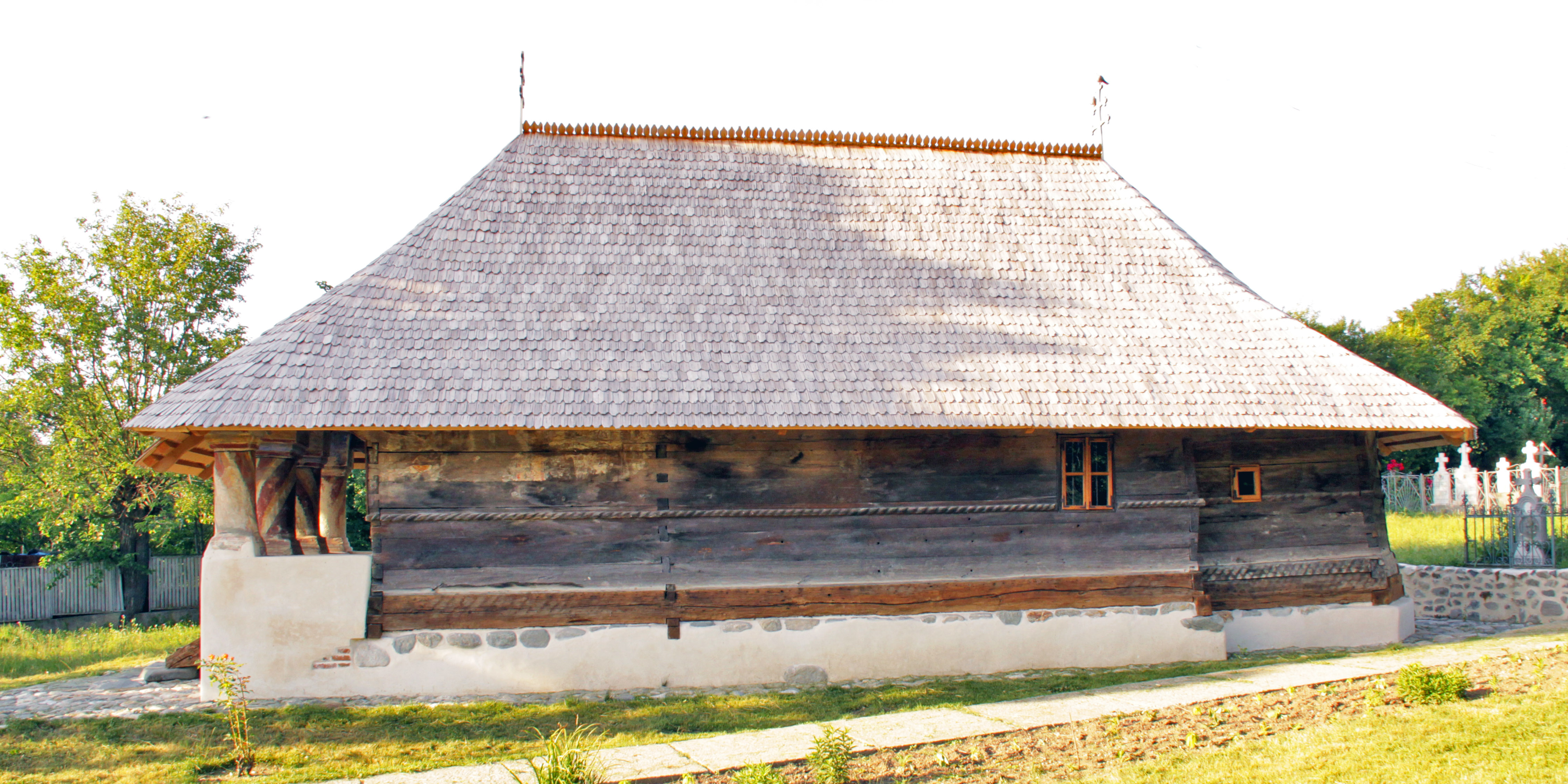 Ibăneşti, Olt: biserica de lemn, latura de miazăzi.